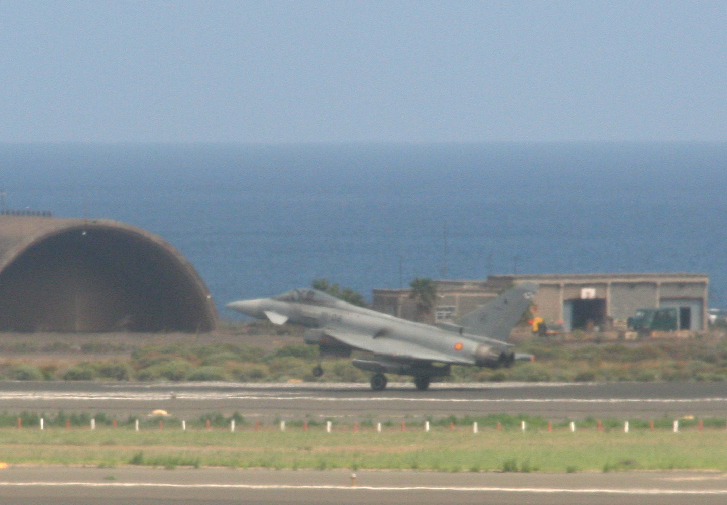 Eurofighter Typhoon en la Base Aérea de gando, Canarias, España.